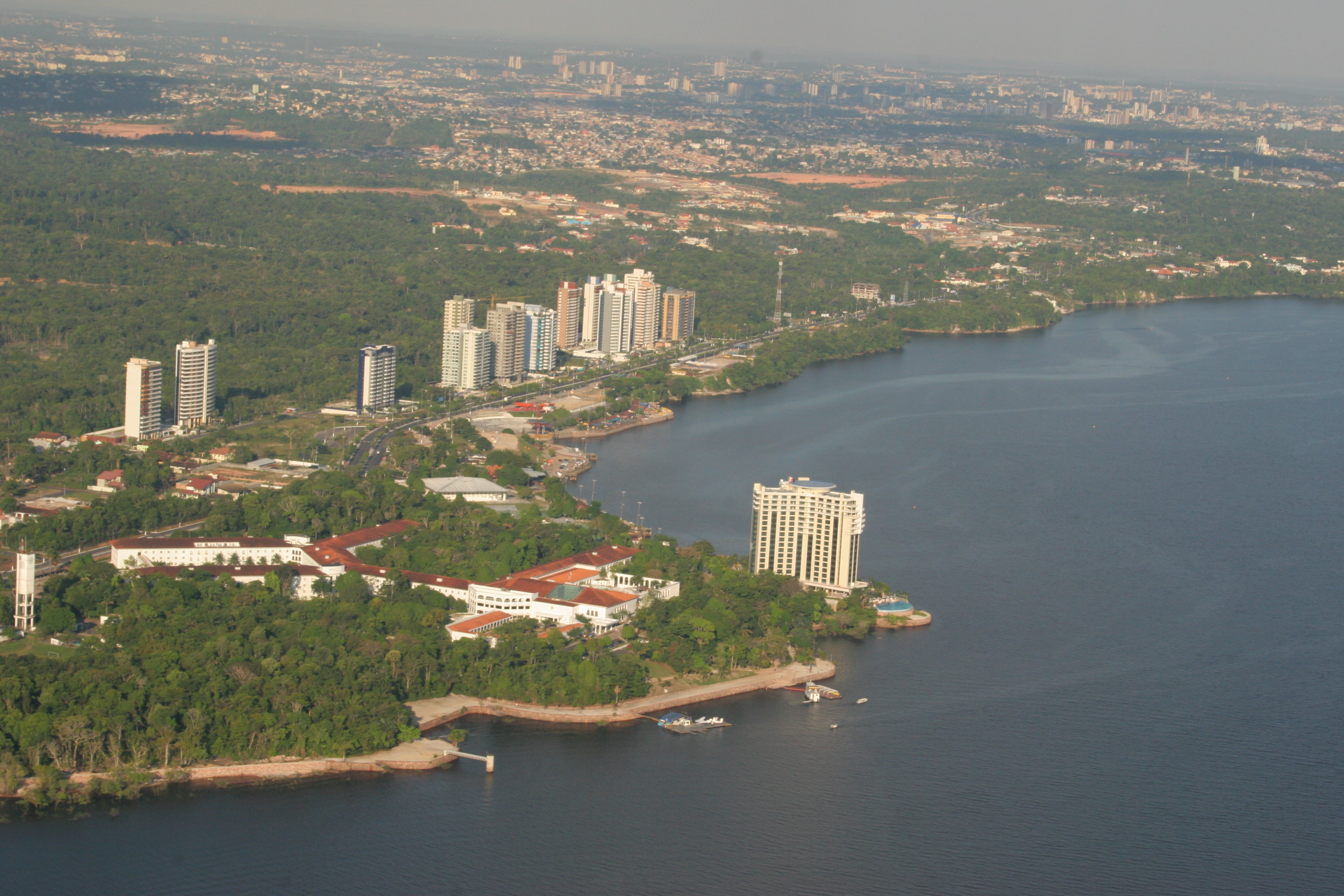 Amazonia fotos aérea região de Manaus 2005 AM Brasil